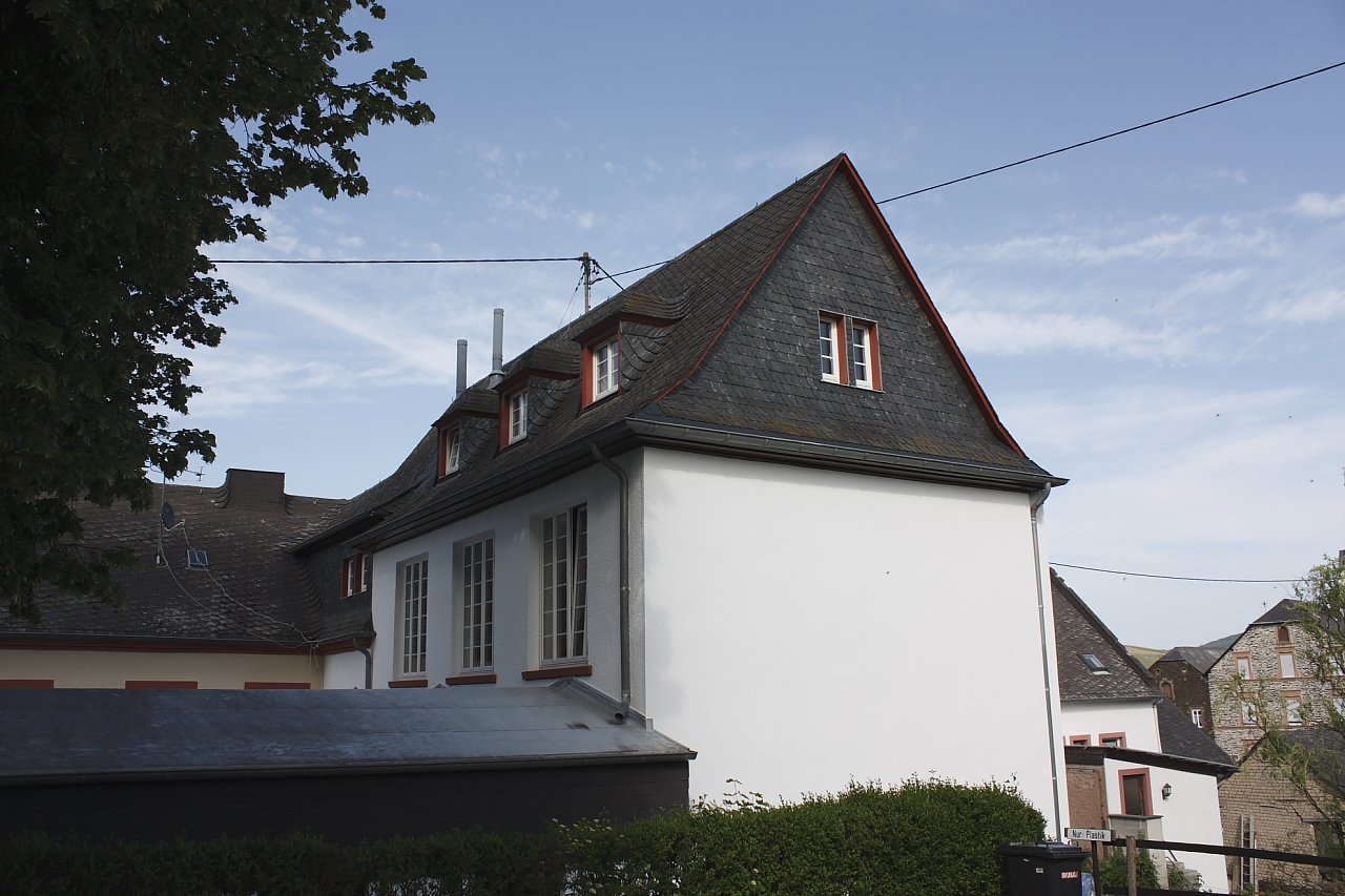 Alte Schule Lösnich. Anbau von 1933 mit zwei neuen Schulsälen.